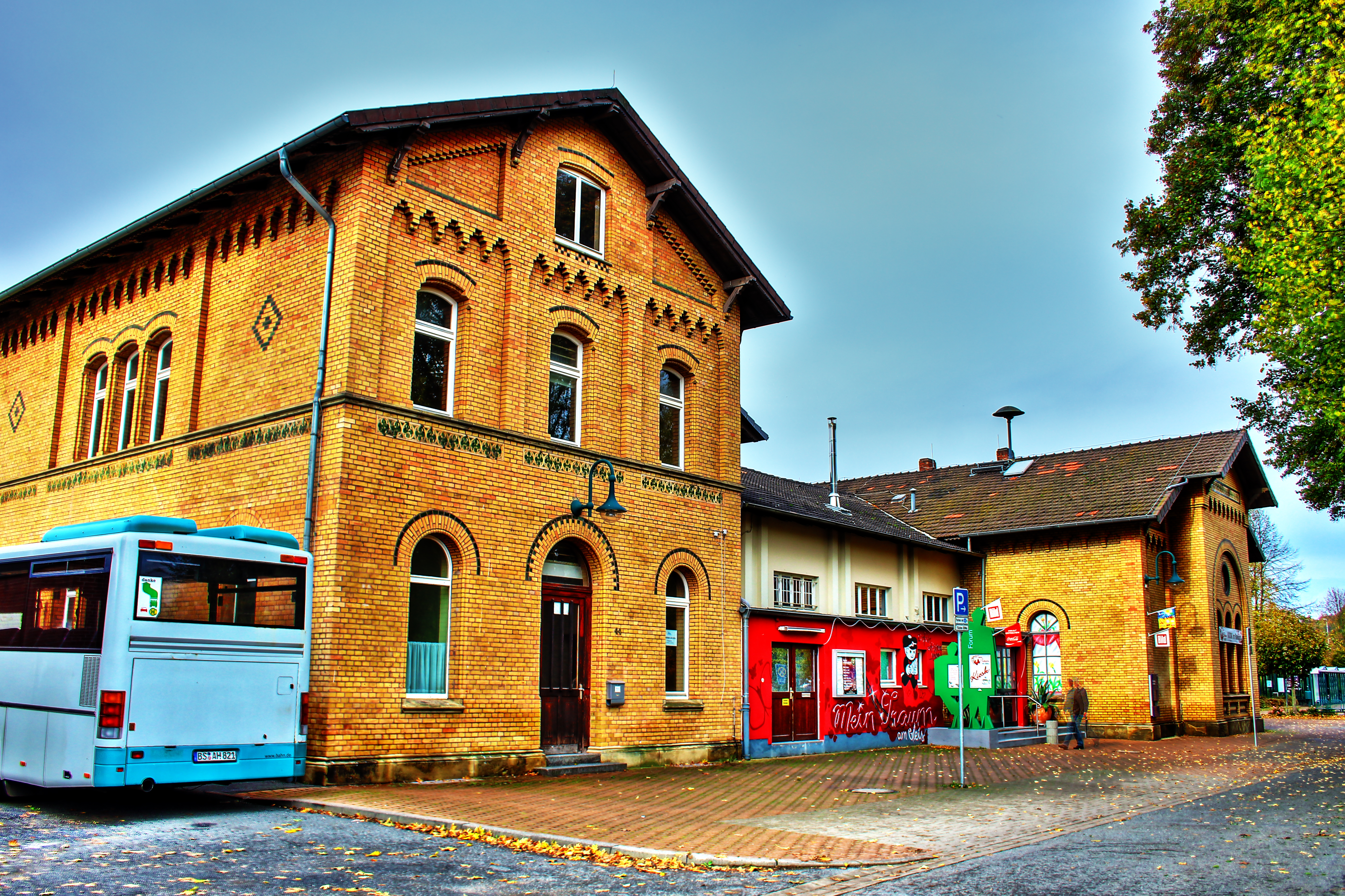 Hauptbahnhof - Duderstädter Straße 4, 37412 Herzberg am Harz, Deutschland